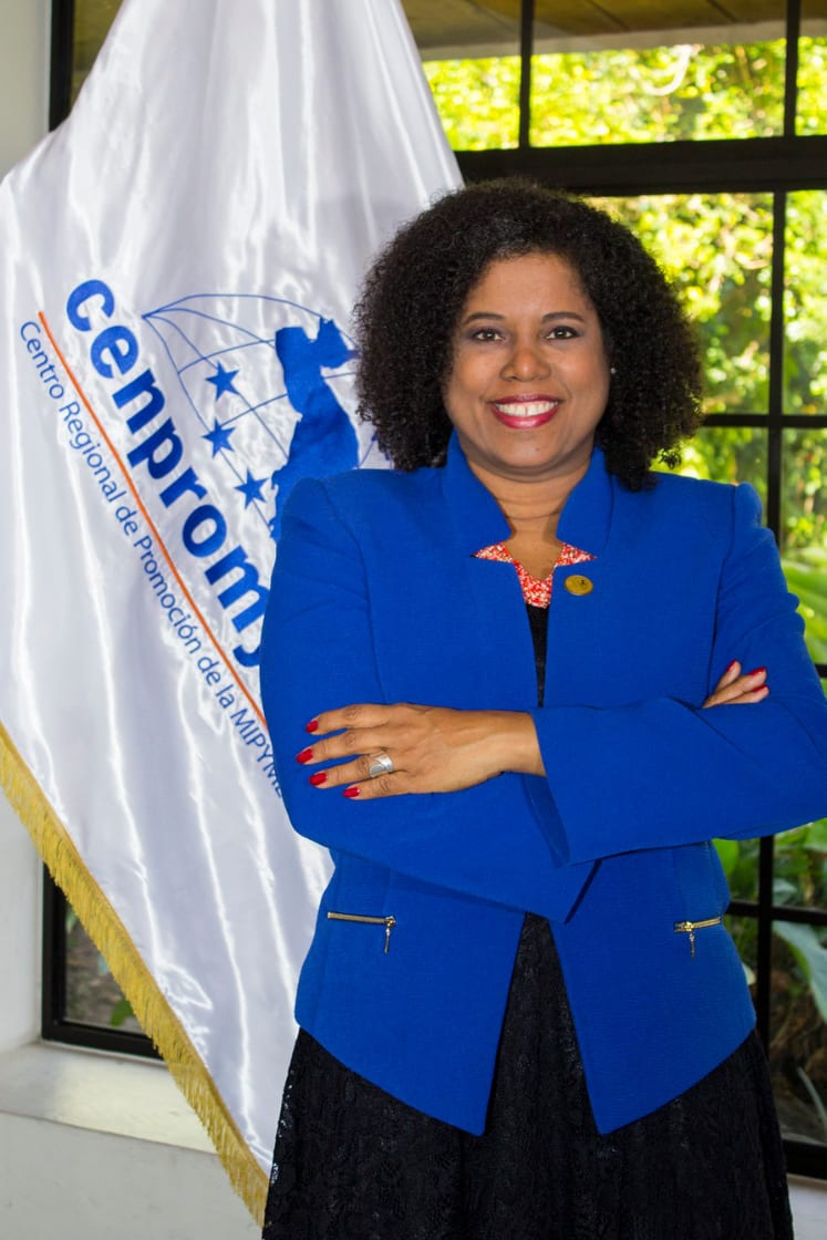 Licenciada Miosotis Rivas Peña